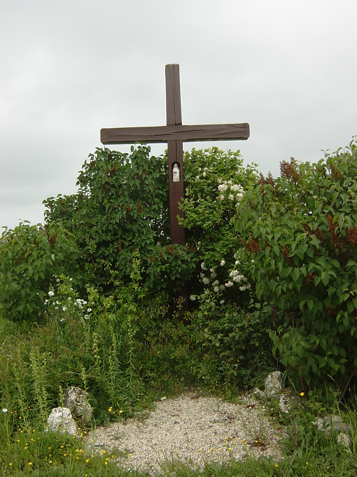 calvaire dédié à Saint Anne au lieu dit le Bieux 56120 la grée Saint laurent, morbihan , france